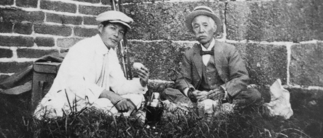 建築遺産撮影時の山本讃七郎（下右）と岩田秀則（下左） 東京大学東洋文化研究所所蔵（日向康三郎氏寄贈資料）